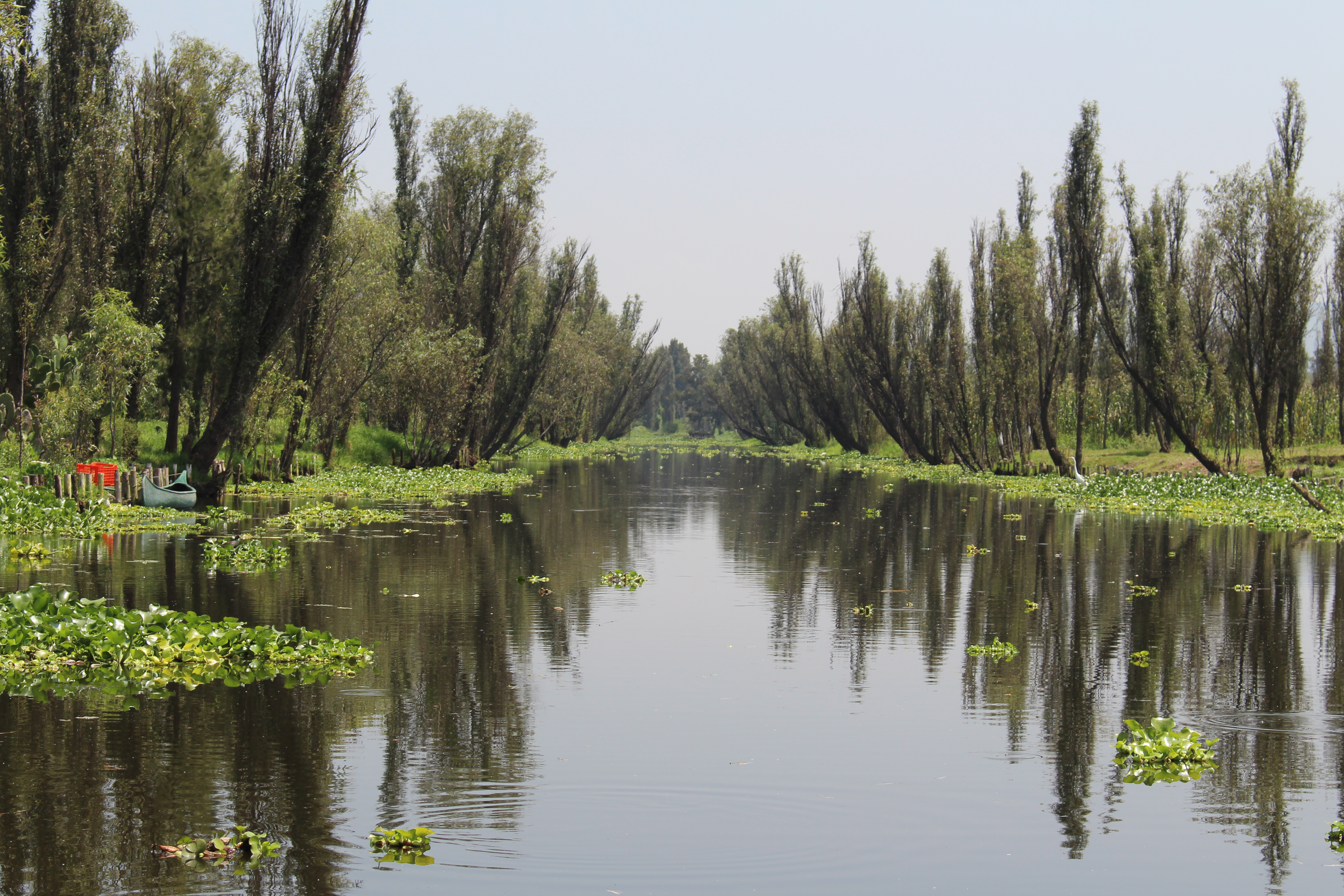 Vista de los canales de Xochimilco en una parte poco transitada. Xochimilco, Ciudad de México.